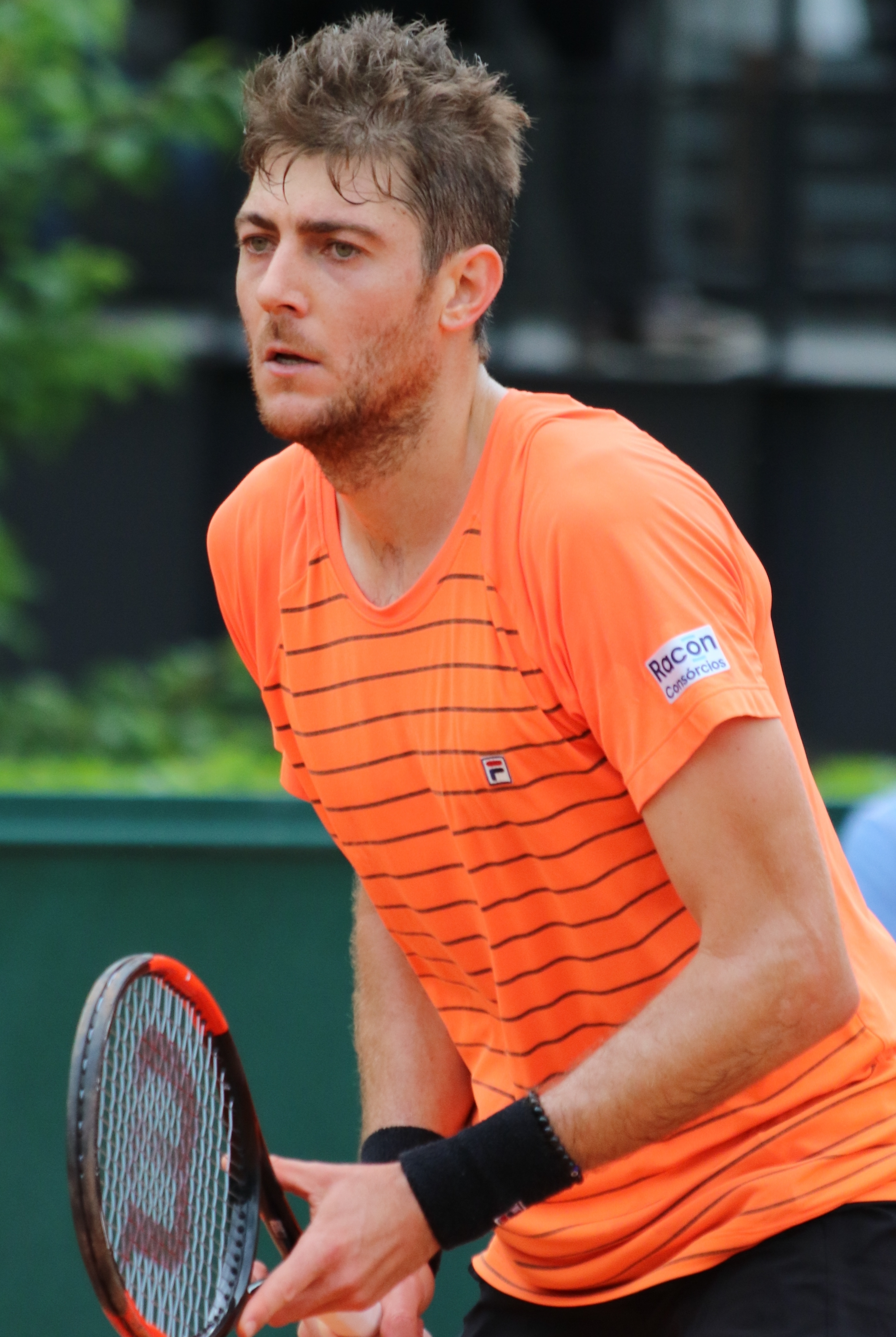 Demoliner RG18 (4)